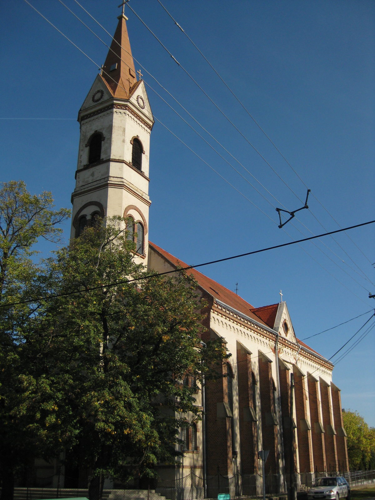 Evangélikus templom (Vadosfa, Rákóczi Ferenc tér) This is a photo of a monument in Hungary, Identifier: 11808